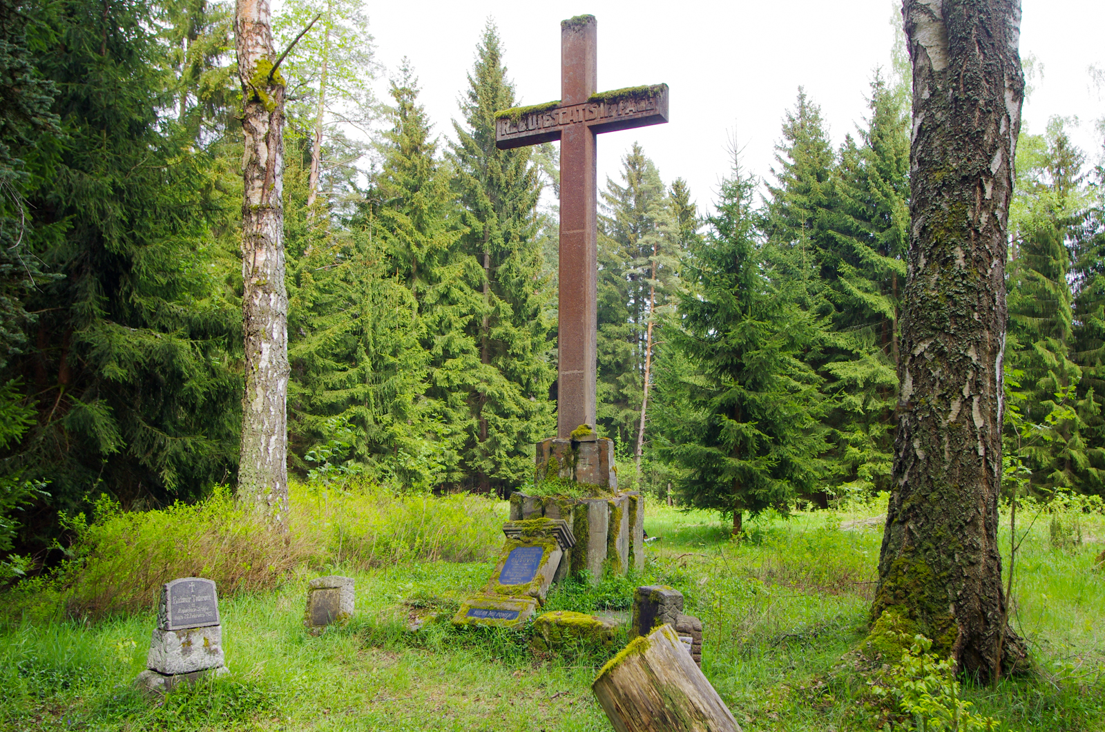 katolická část hřbitova zajateckého tábora z 1. světové války v Jindřichovicích, okres Sokolov